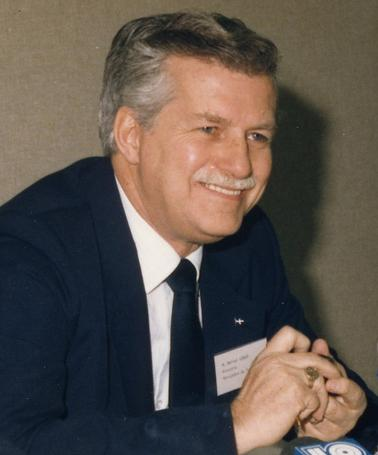 Conférence de presse de M. Marcel Léger, ministre du Tourisme du Québec